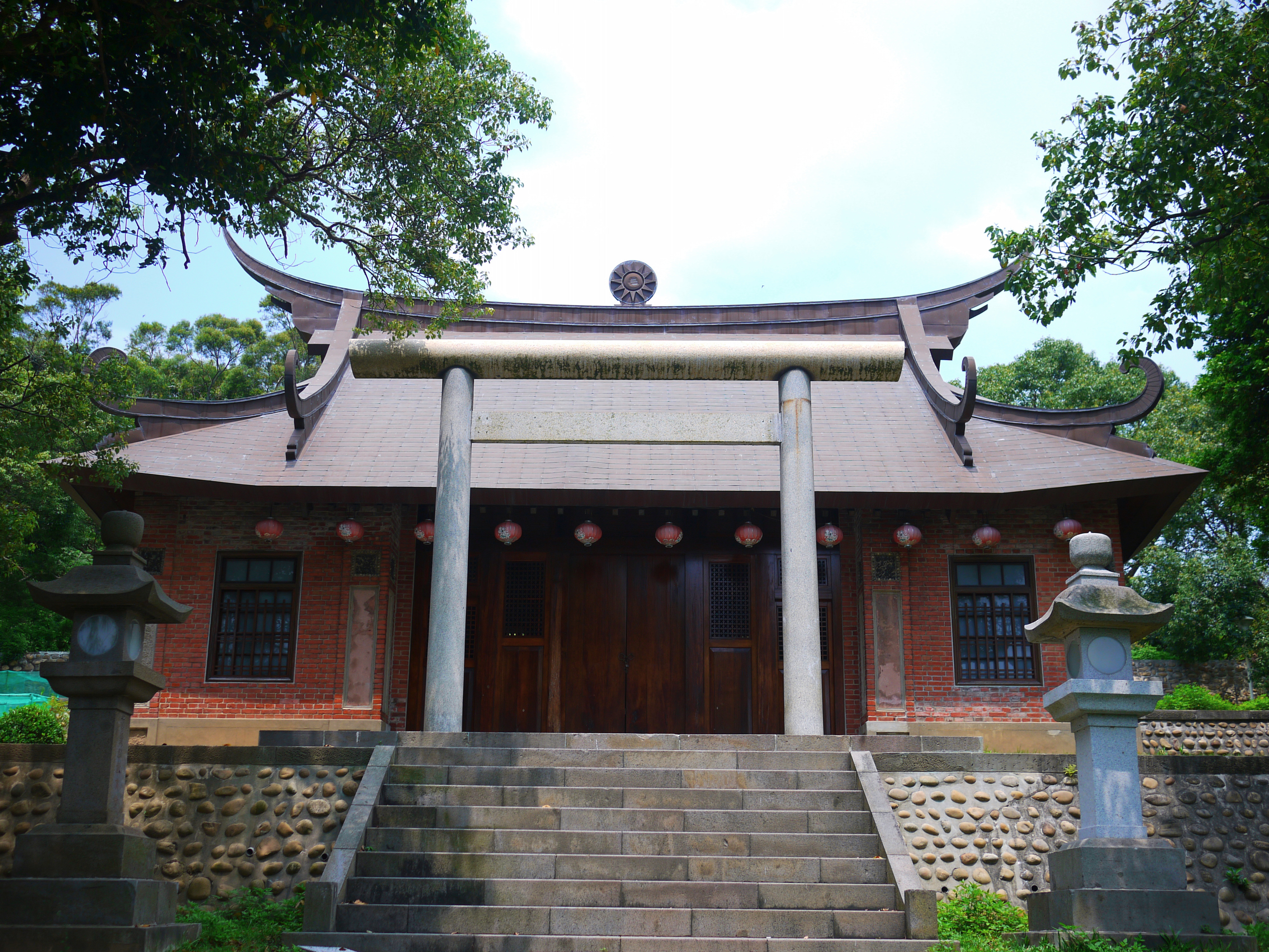 苗栗通霄神社